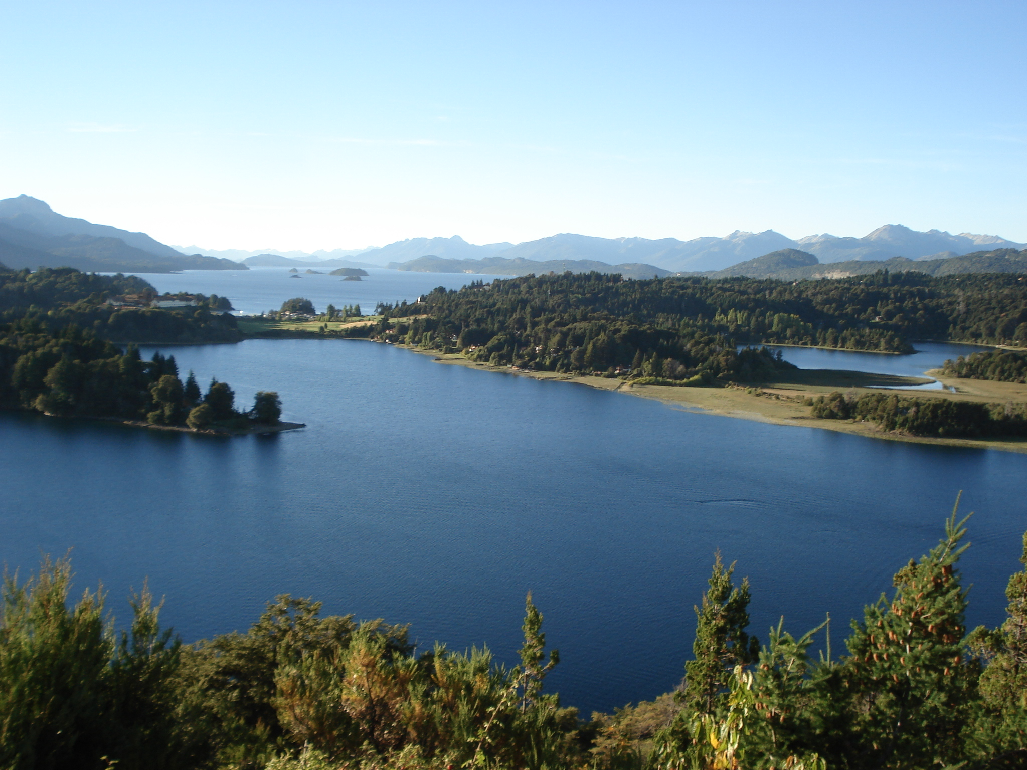 Villa Llao Llao